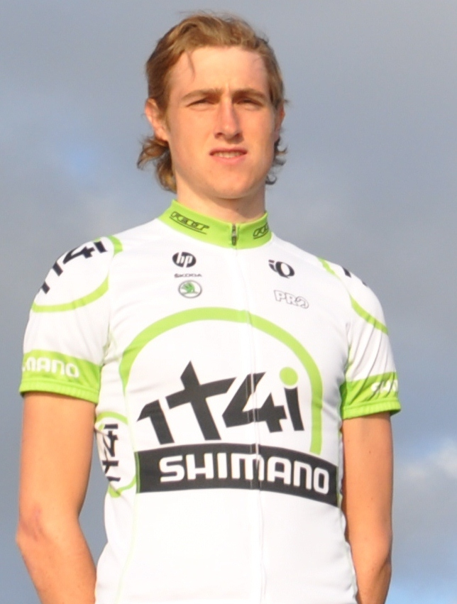 Tobias Ludvigsson